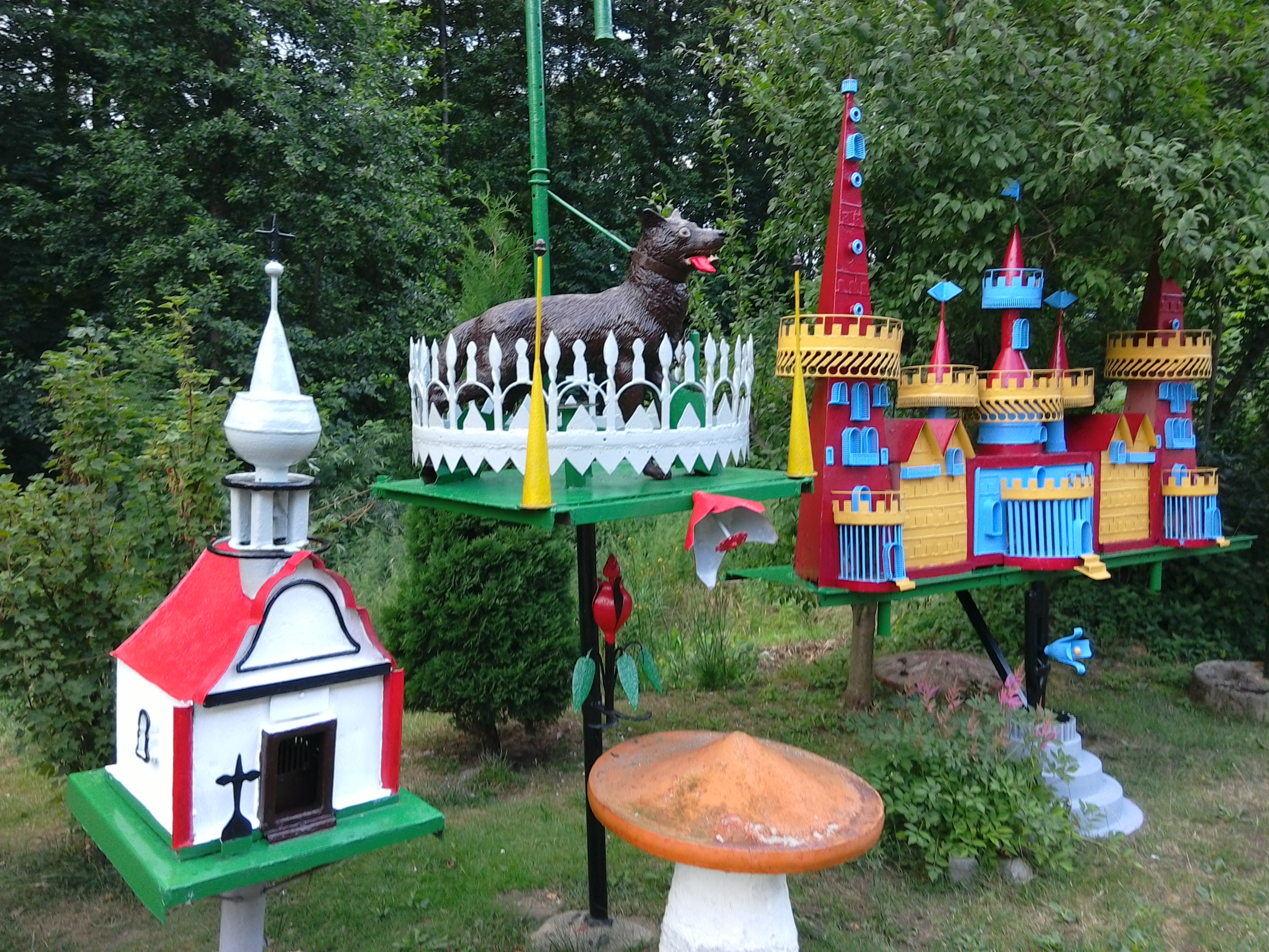 Hradiště